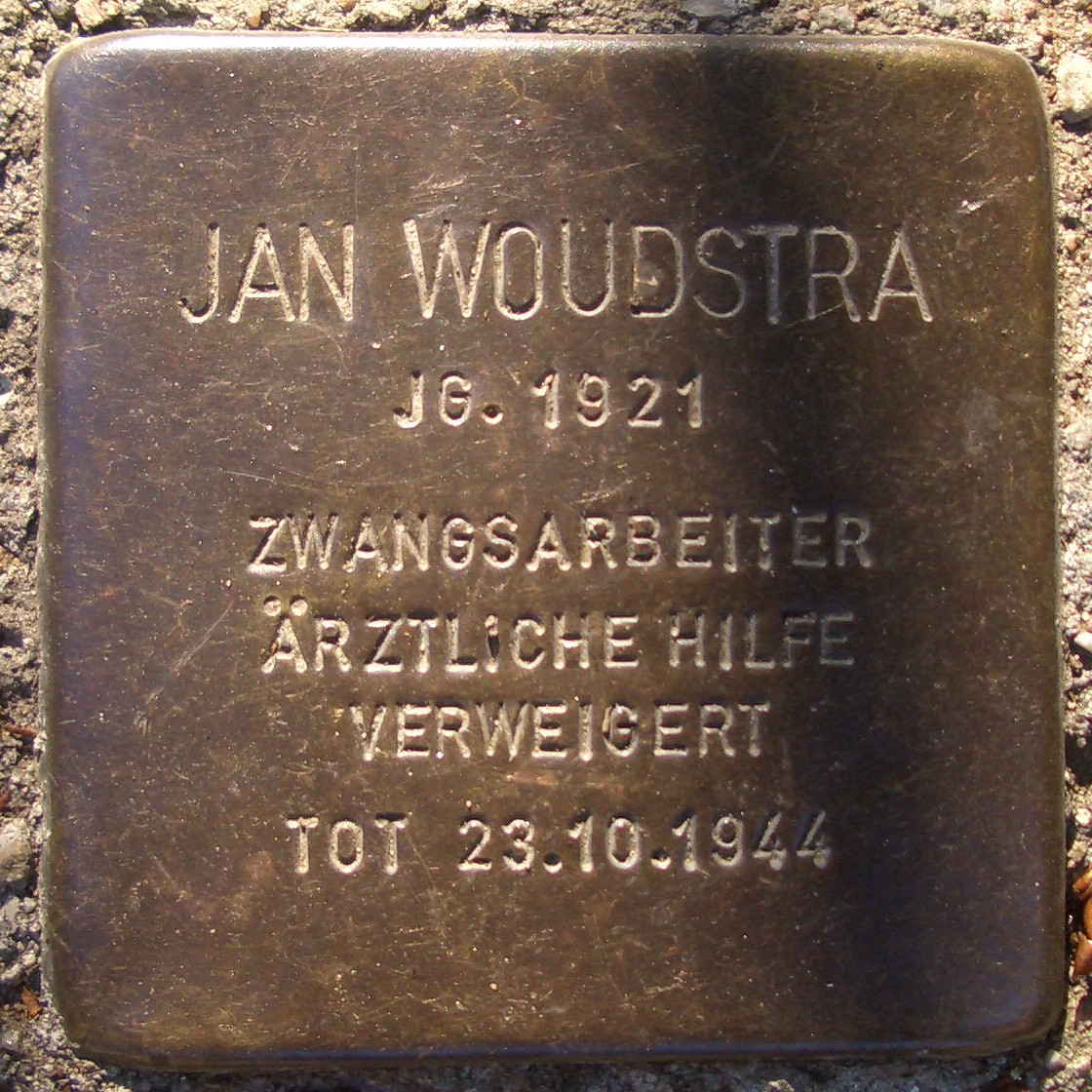 Stolperstein für Jan Woudstra vor dem Gebäude Wilhelm-Raabe-Weg 23 in Hamburg-Fuhlsbüttel.